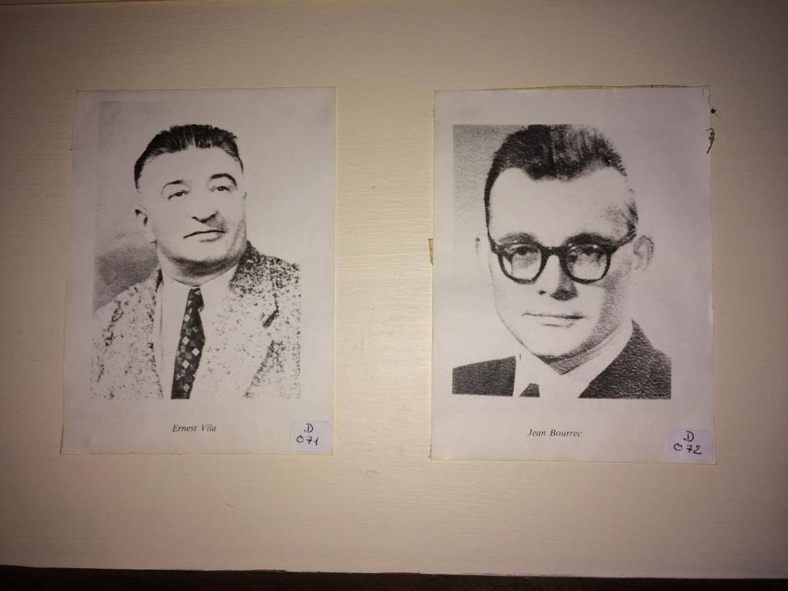 Portrait photo pris au musée de la Résistance à Auch